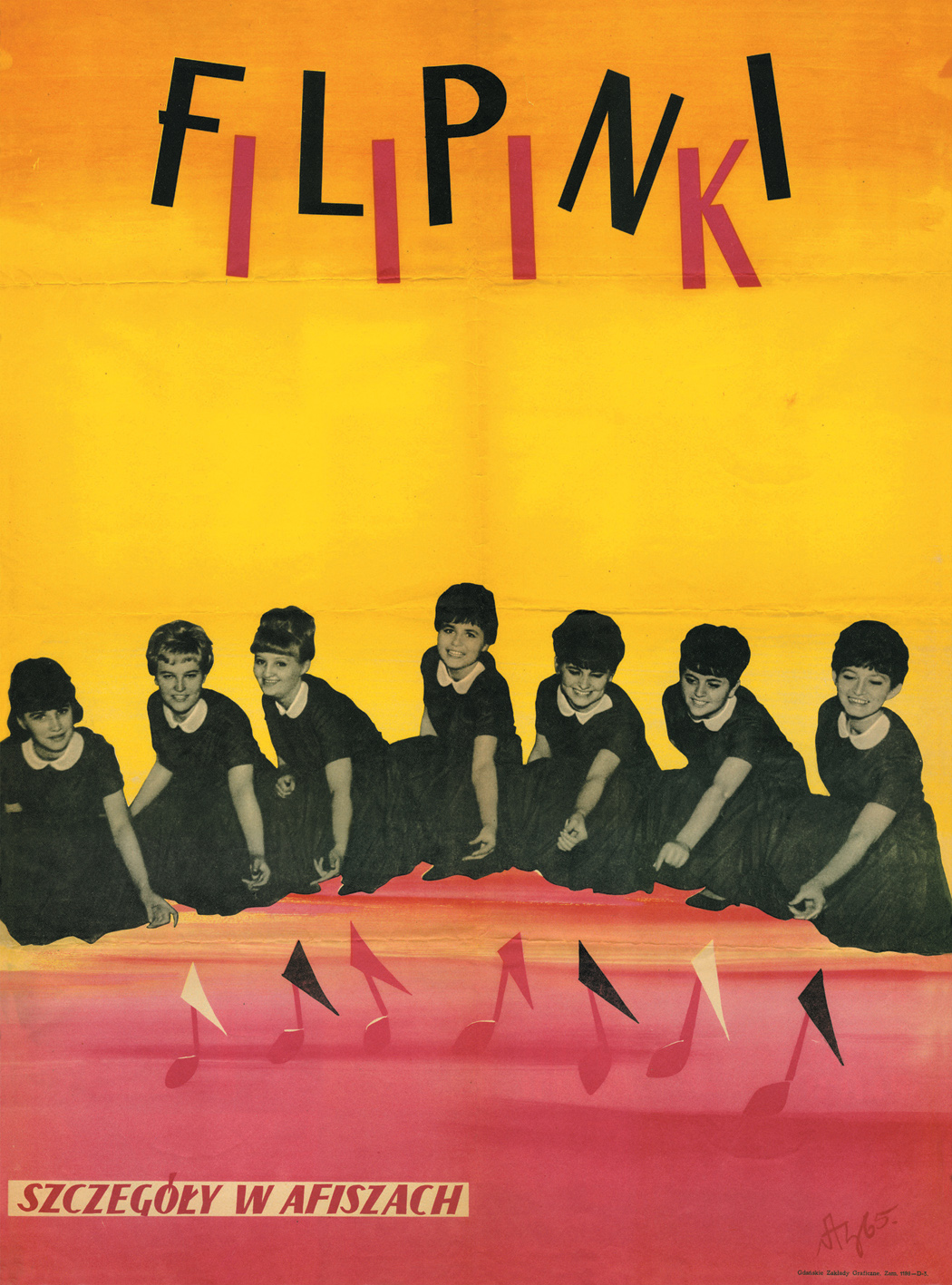 Plakat reklamujący występy zespołu Filipinki w 1965 r.